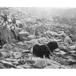 Buffali a capo Sparbo